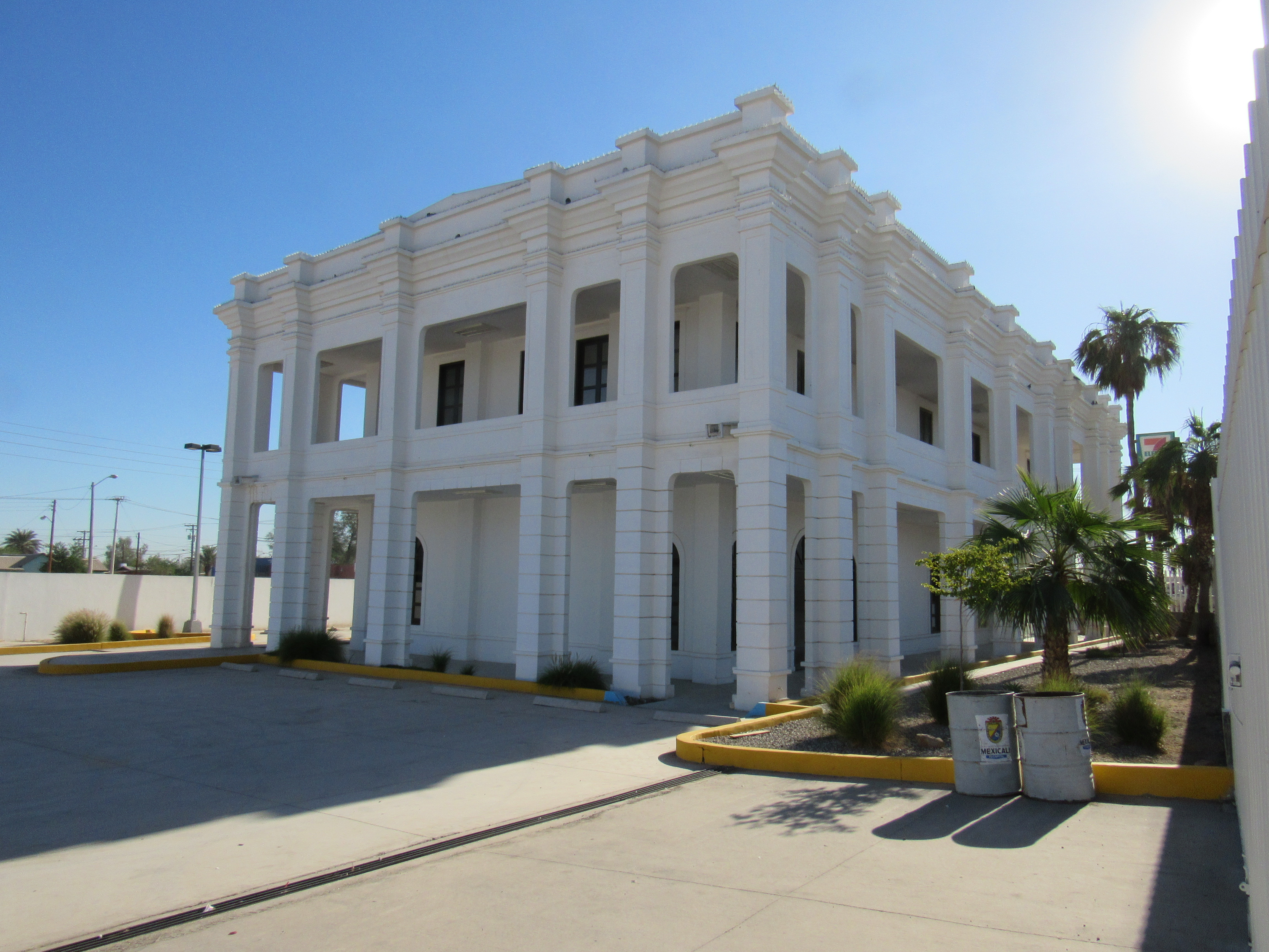 Esta es una imagen de las caras oeste (a la izquierda en la foto)y sur (a la derecha en la imagen) del edificio. La cara sur es la que yace paralela a la carretera federal 2 que va de Mexicali a Tijuana. En esta imagen del 2017 el edificio se encuentra reconstruido después de haber sido abandonado tras el terremoto del 2010.